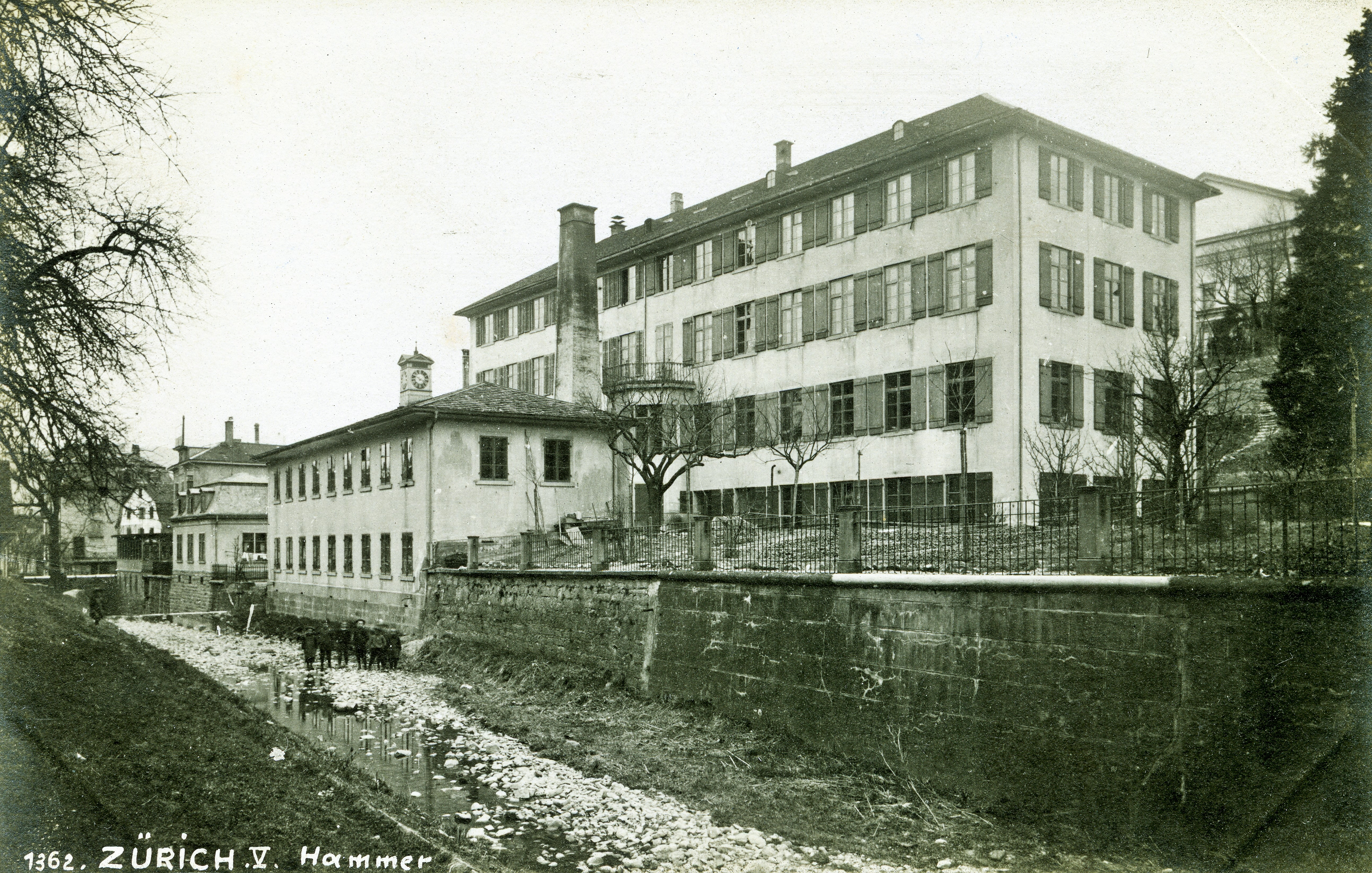 Seidenzwirnerei Neumünster, Hammerstrasse 20; Fabrik Hammerstrasse 18, Zürich, Schweiz, Baujahr 1840